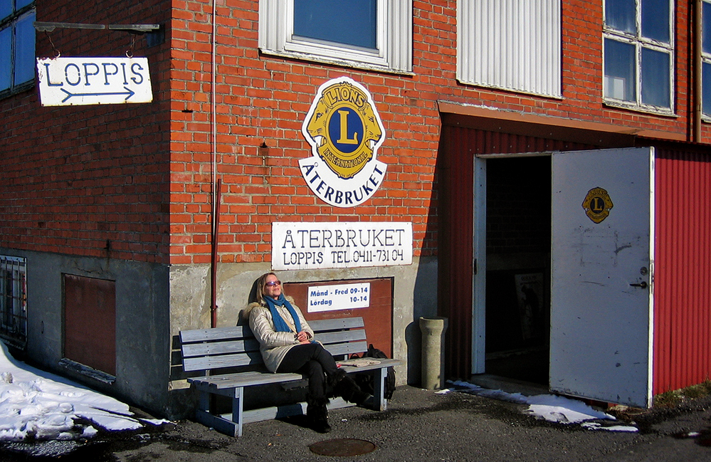 Lions Loppis "Återbruket" i Ystad 7 mars 2006.